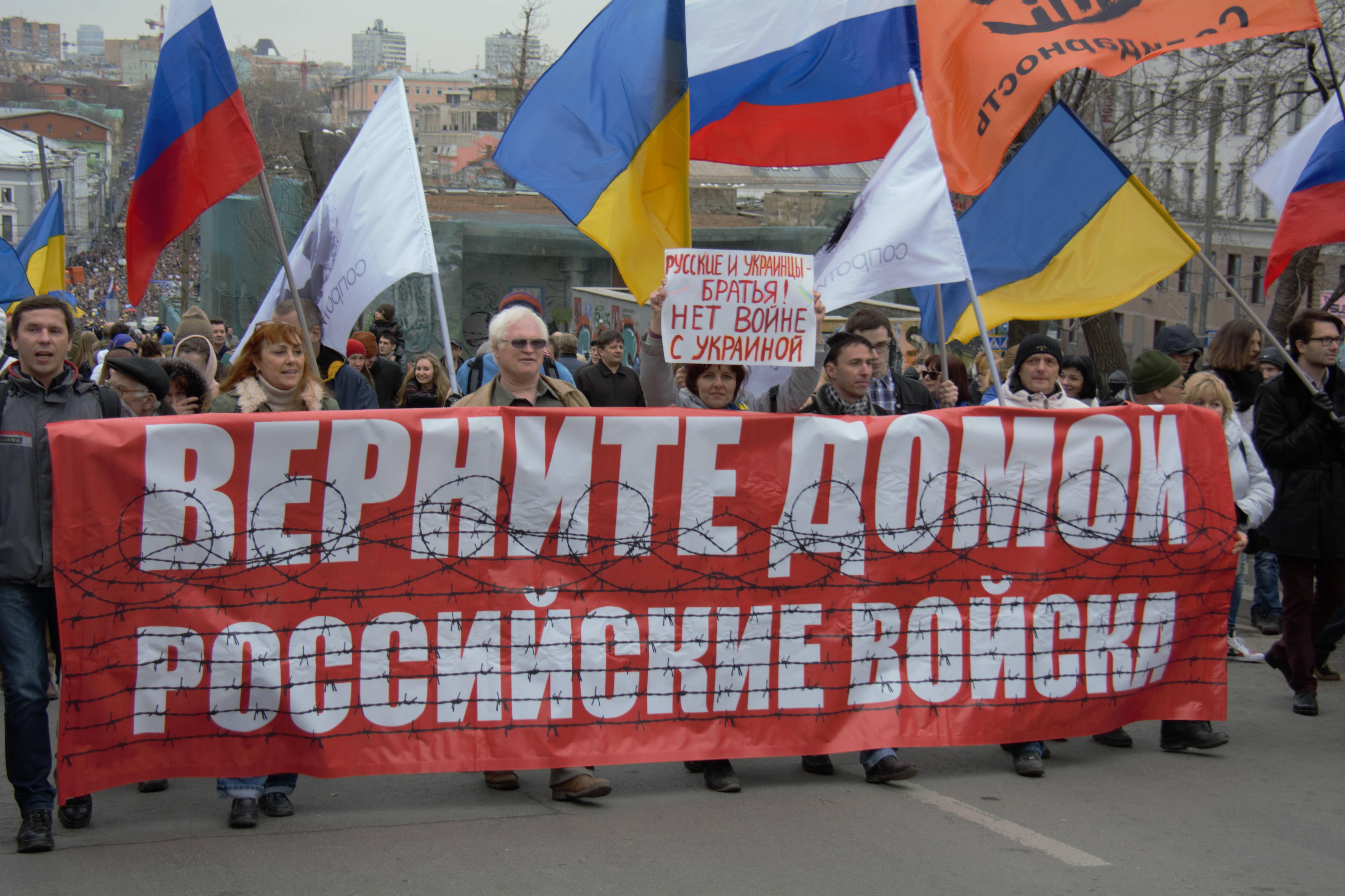 Верните домой российские войска